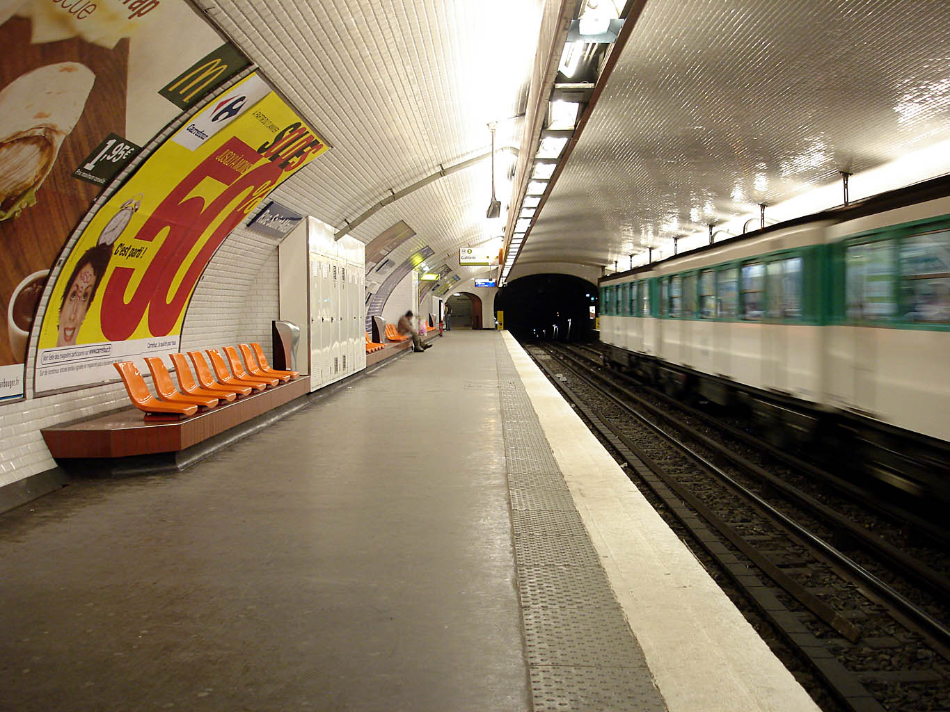 Station Rue Saint-Maur de la ligne 3 du métro de Paris, France.